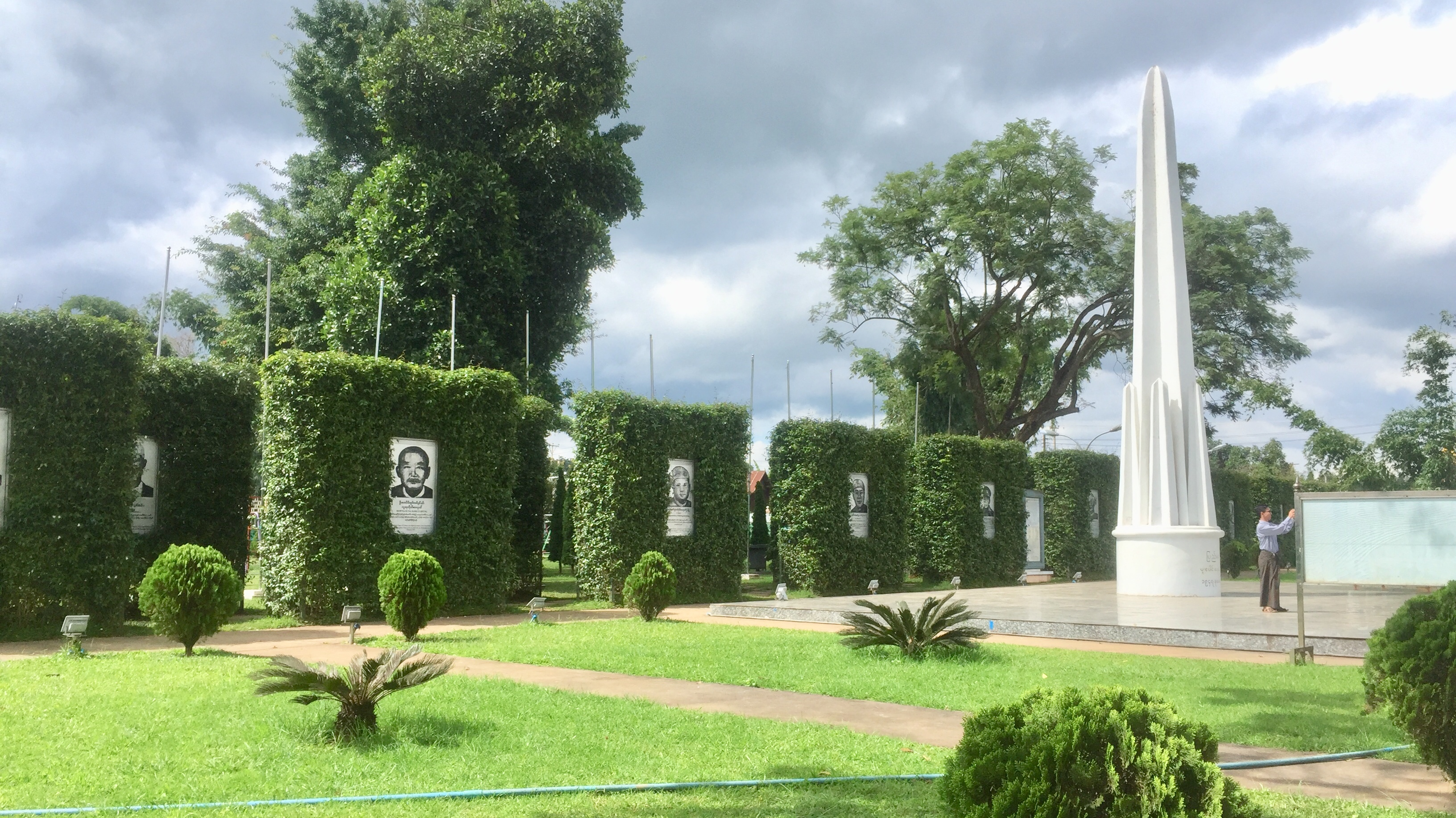 မြန်မာဘာသာ: မြန်မာနိုင်ငံ ရှမ်းပြည်နယ်တောင်ပိုင်း ပင်လုံမြို့တွင်တည်ရှိသော သမိုင်းဝင် ပင်လုံကျောက်တိုင်ဖြစ်ပါသည်